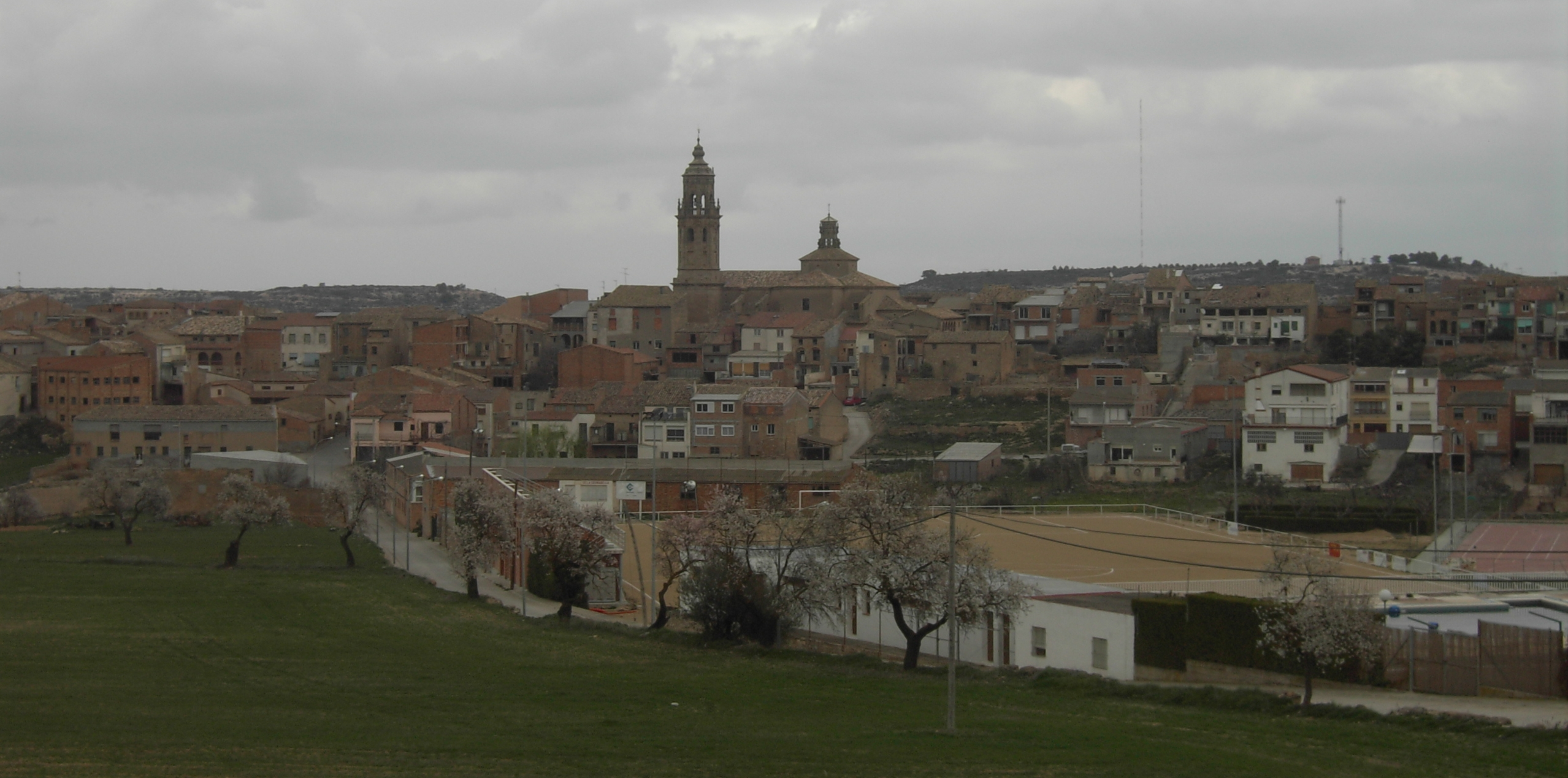 View of La Granadella, Catalonia